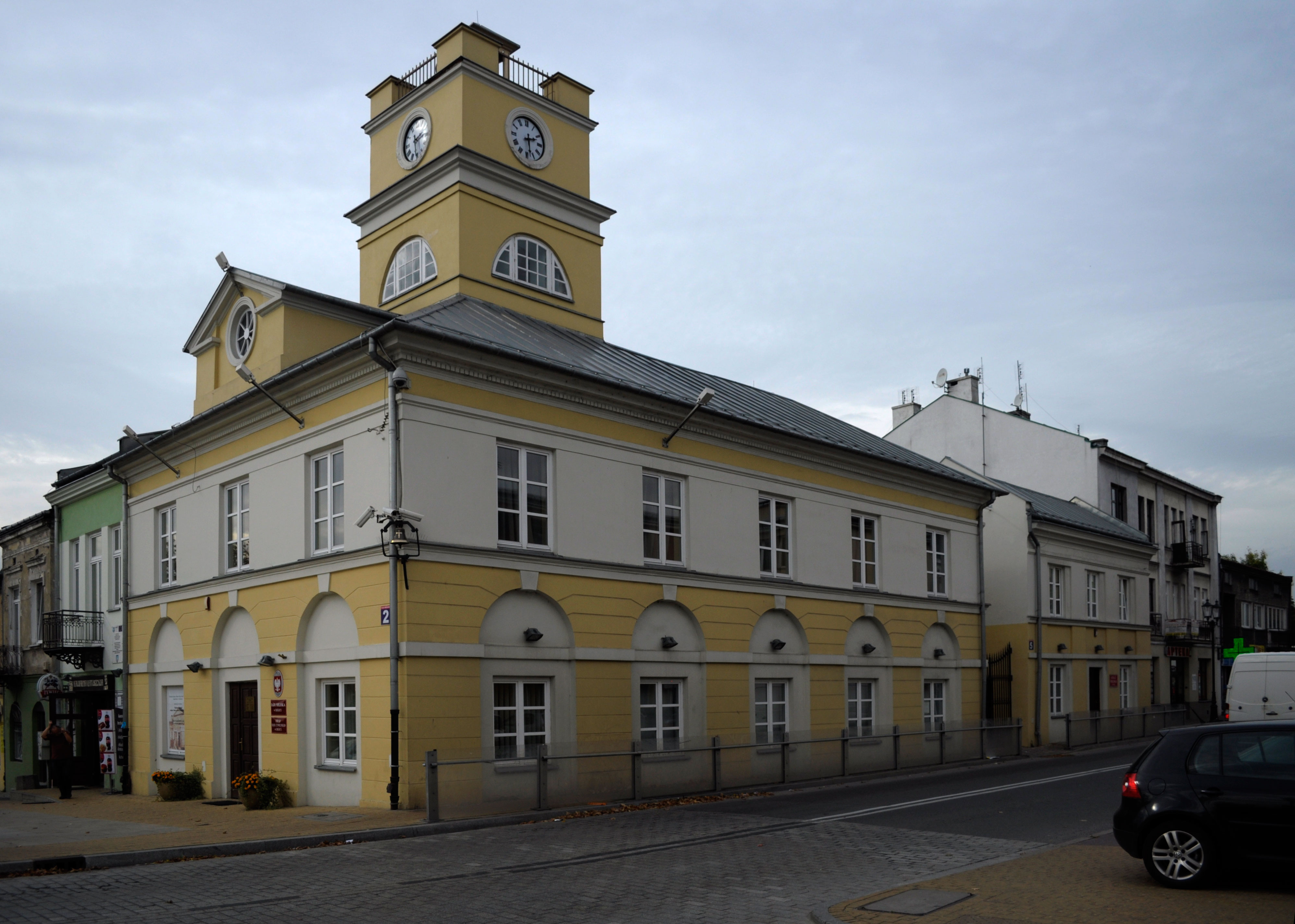 Grójec - ratusz, 1 poł. XIX (zabytek nr 473/A/62 oraz 131/A)